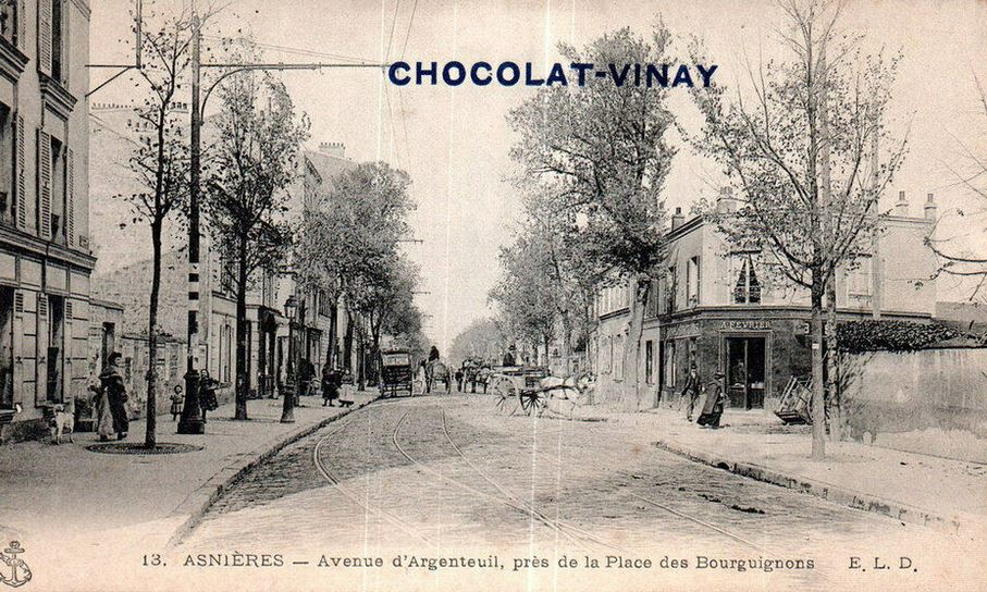 Asnières-sur-Seine.Avenue d'Argenteuil.Place des Bourguignons.Chocolats Vinay